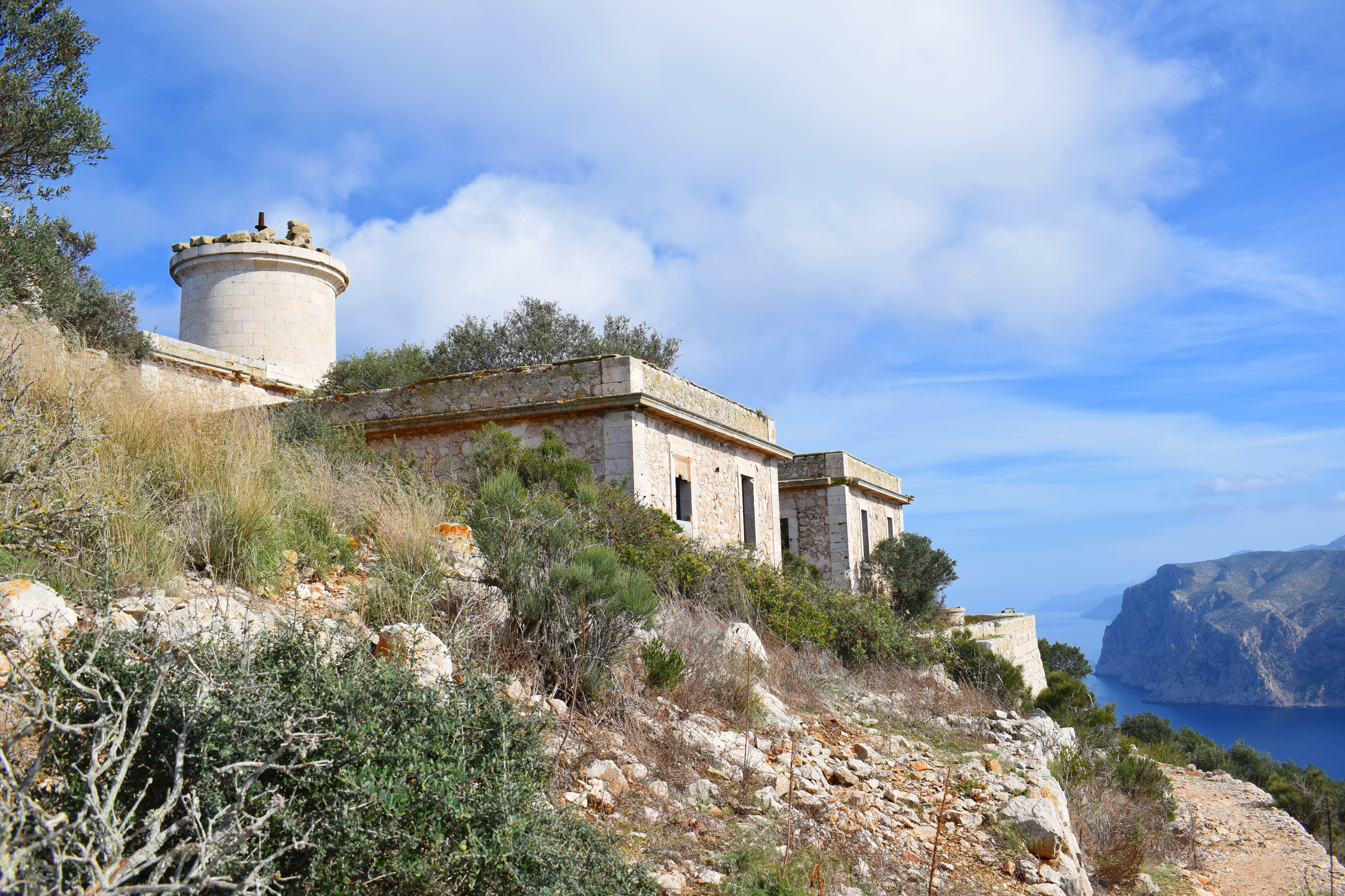 Ruine des 1910 außer Betrieb genommenen Leuchtturms Far de Na Pòpia auf der Insel Sa Dragonera, Balearen, Spanien.